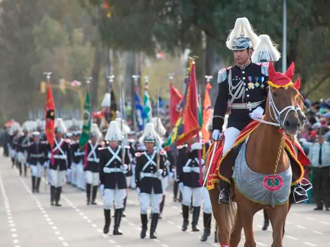 Cadetes del colegio militar de ejercito de bolivia en un desfile de parada en la ciuda de la paz